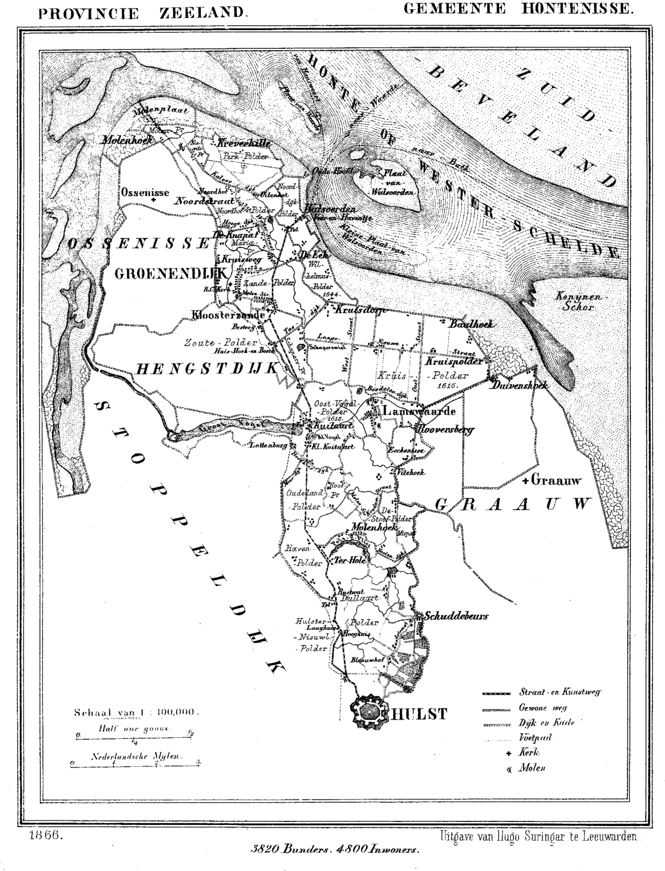 Gemeente Hontenisse, Zeeland, Nederland